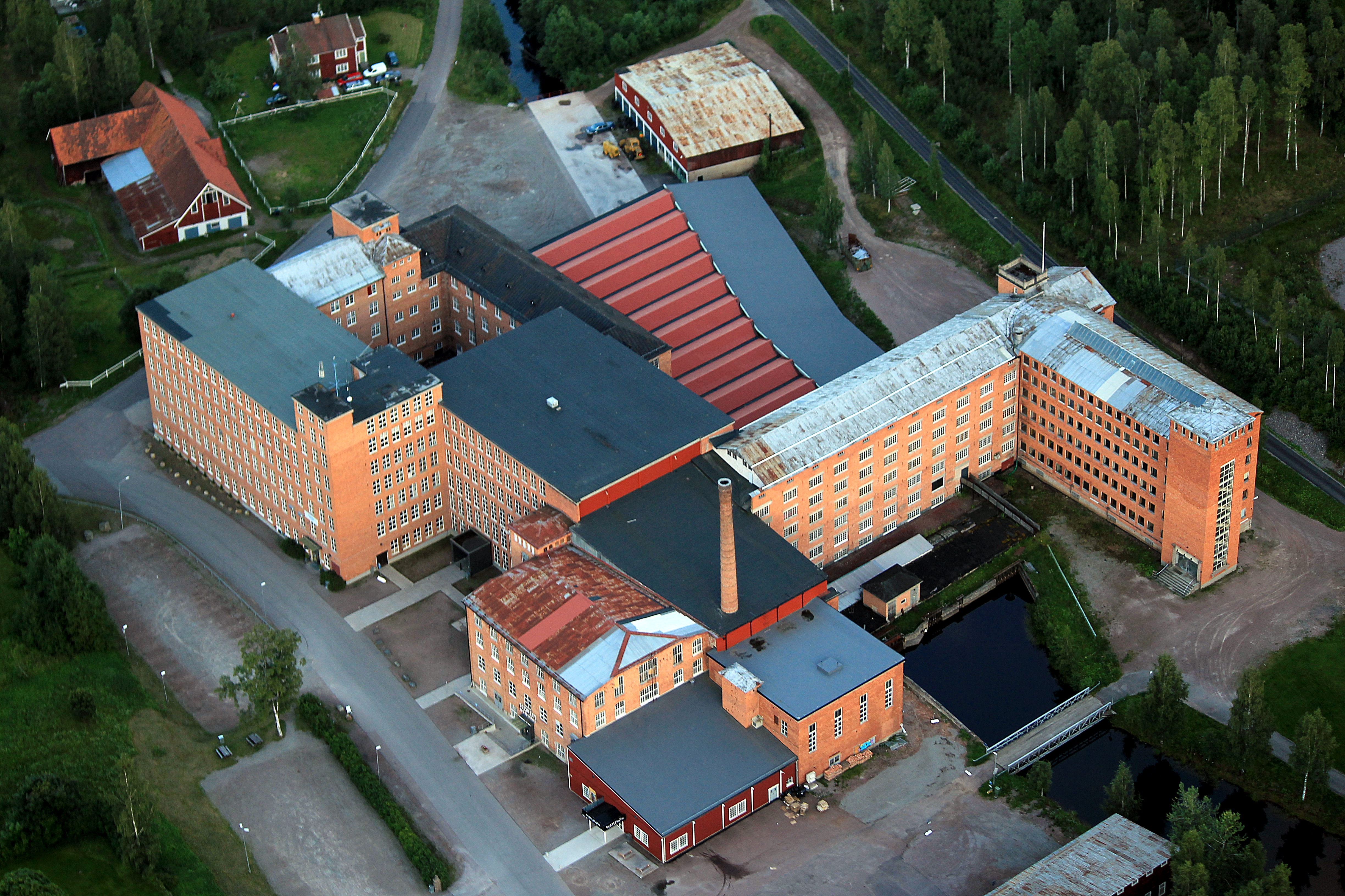 Flygfoto över gamla yllefabriken (Tidstrands Yllefabriker) i Sågmyra, Falu kommun, Dalarnas län, Sverige. This aerial photograph has been approved for publishing by the Swedish Armed Forces with the ID: FMTM 10 830:11043 This tag does not indicate the copyright status of the attached work. A normal copyright tag is still required. See Commons:Licensing for more information. English | svenska | +/−